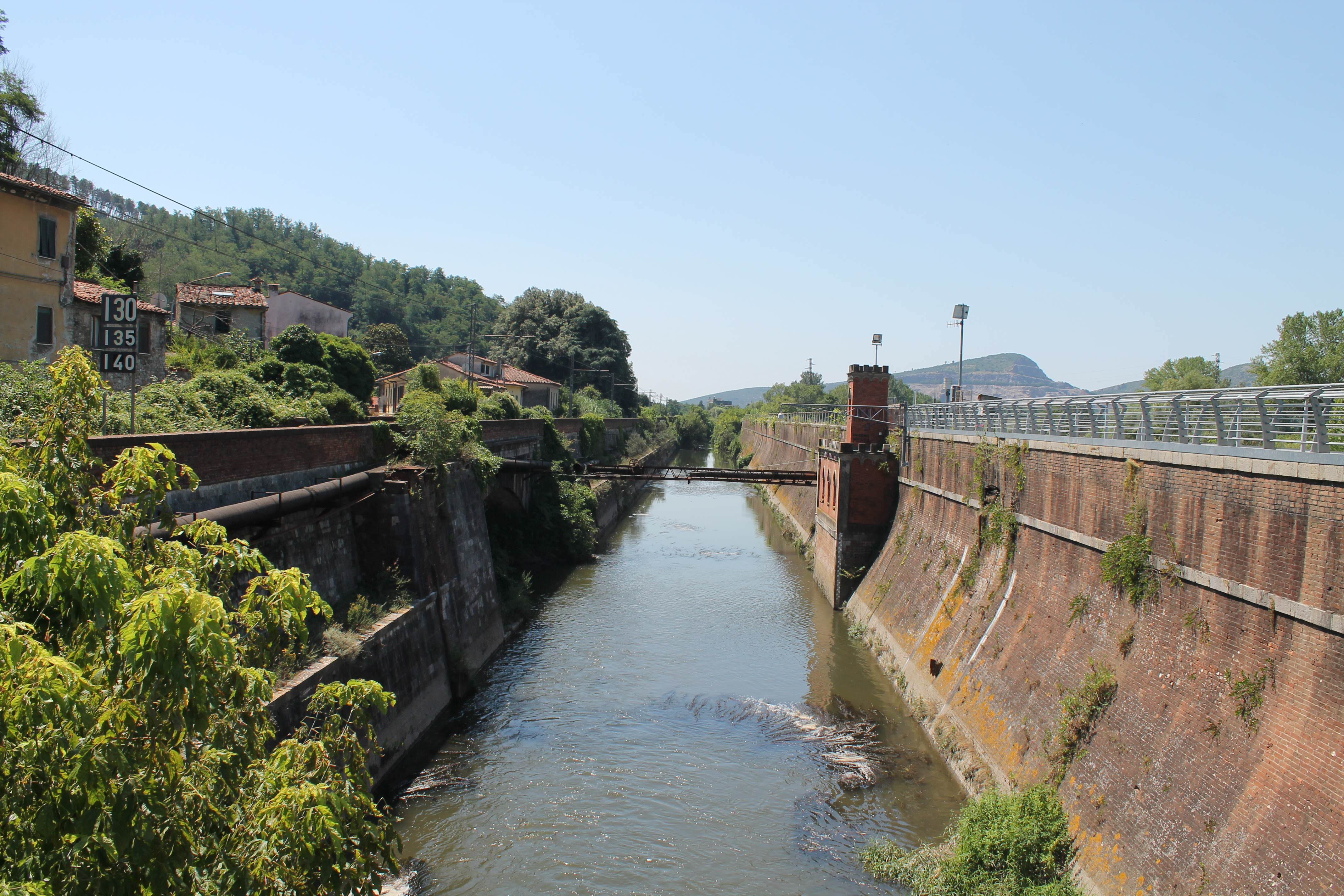 Canale Ozzeri presso Ripafratta (PI)